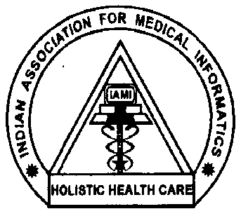 IAMI Logo